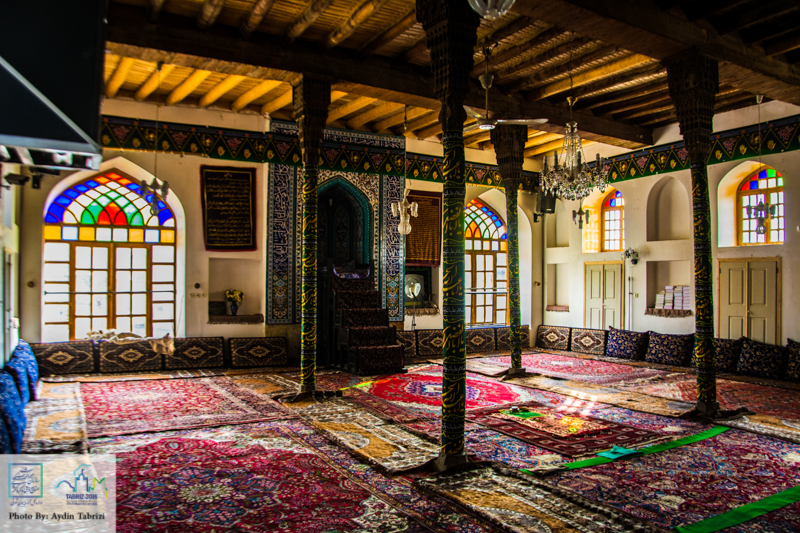 مسجد میدان بناب (مسجد گزاوش)